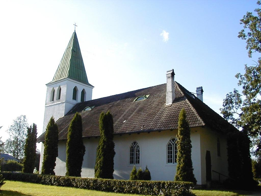 Strenču evanģēliski luteriskā baznīca 2000-08-05